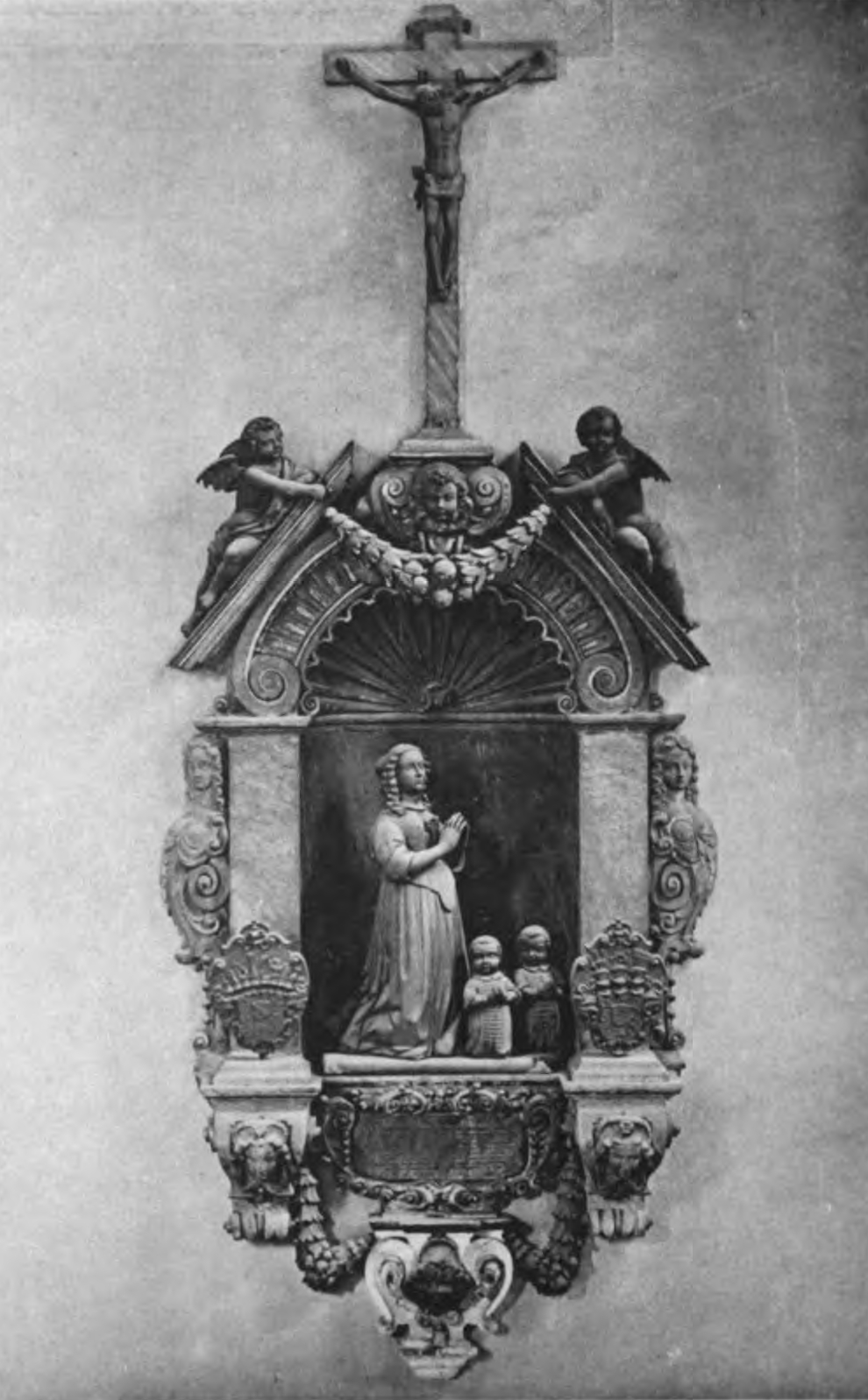 Epitaph der Herzogin Sophie Hedwig an der Nordwand des Chores der Dresdner Sophienkirche